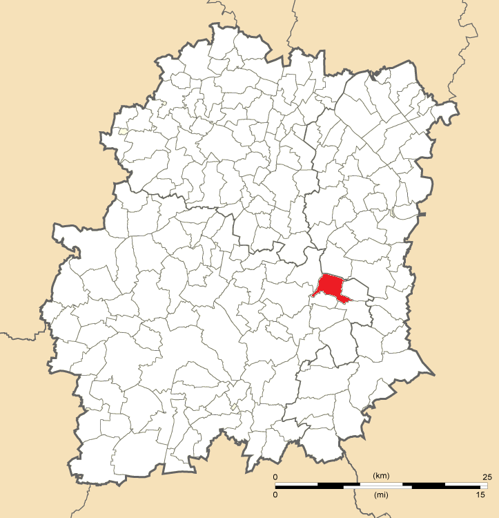 Carte de position de Baulne en Essonne (91)